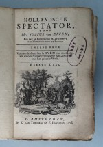 De_Hollandsche_Spectator - holenderska gazeta wychodząca w latach 1731-1735